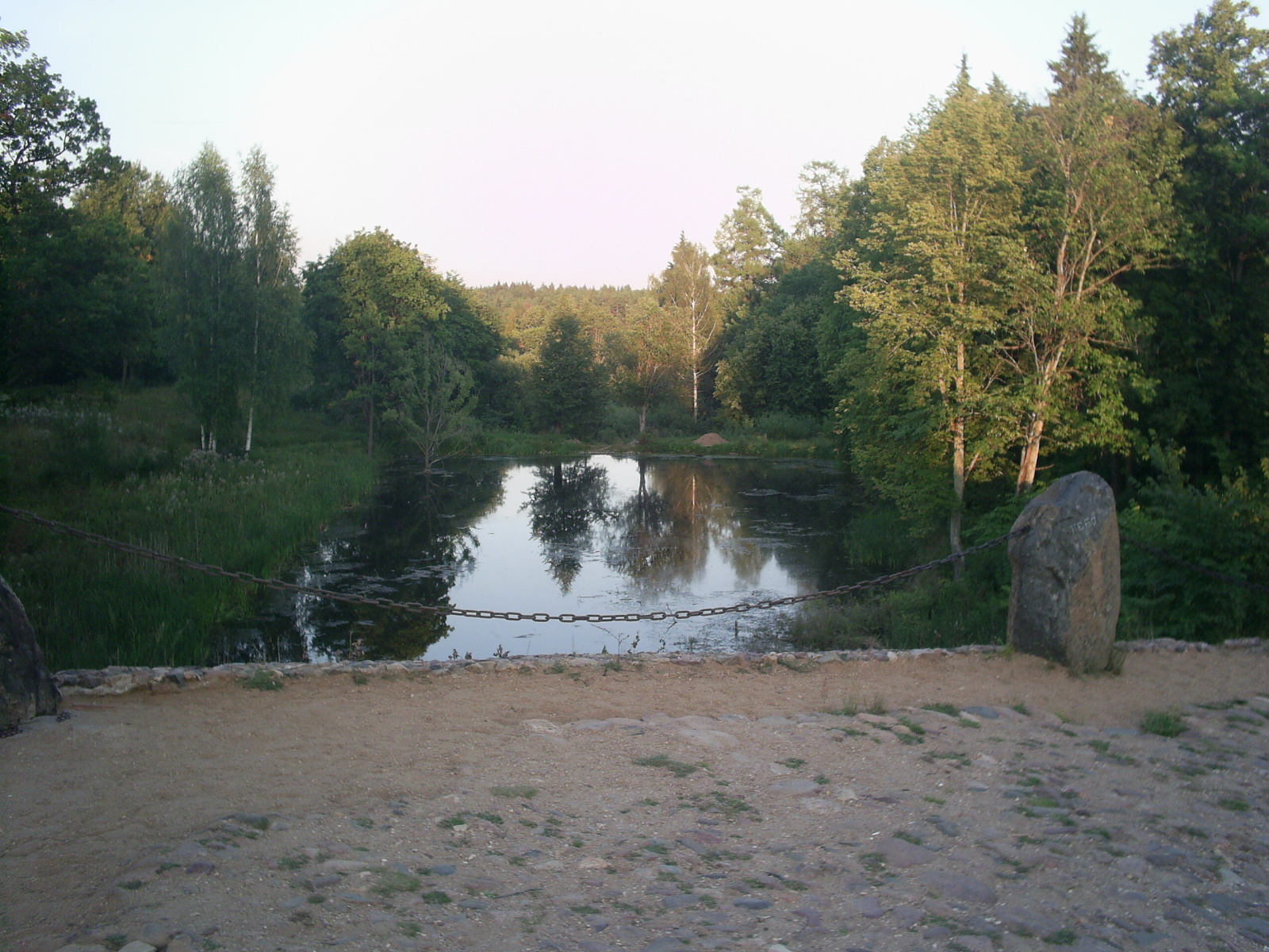 Село Василево Торжокского района Тверской области. Вид с моста архитектора Н. А. Львова, выполненного в технике «архивольт», в просторечии называемый «Чертов мост».